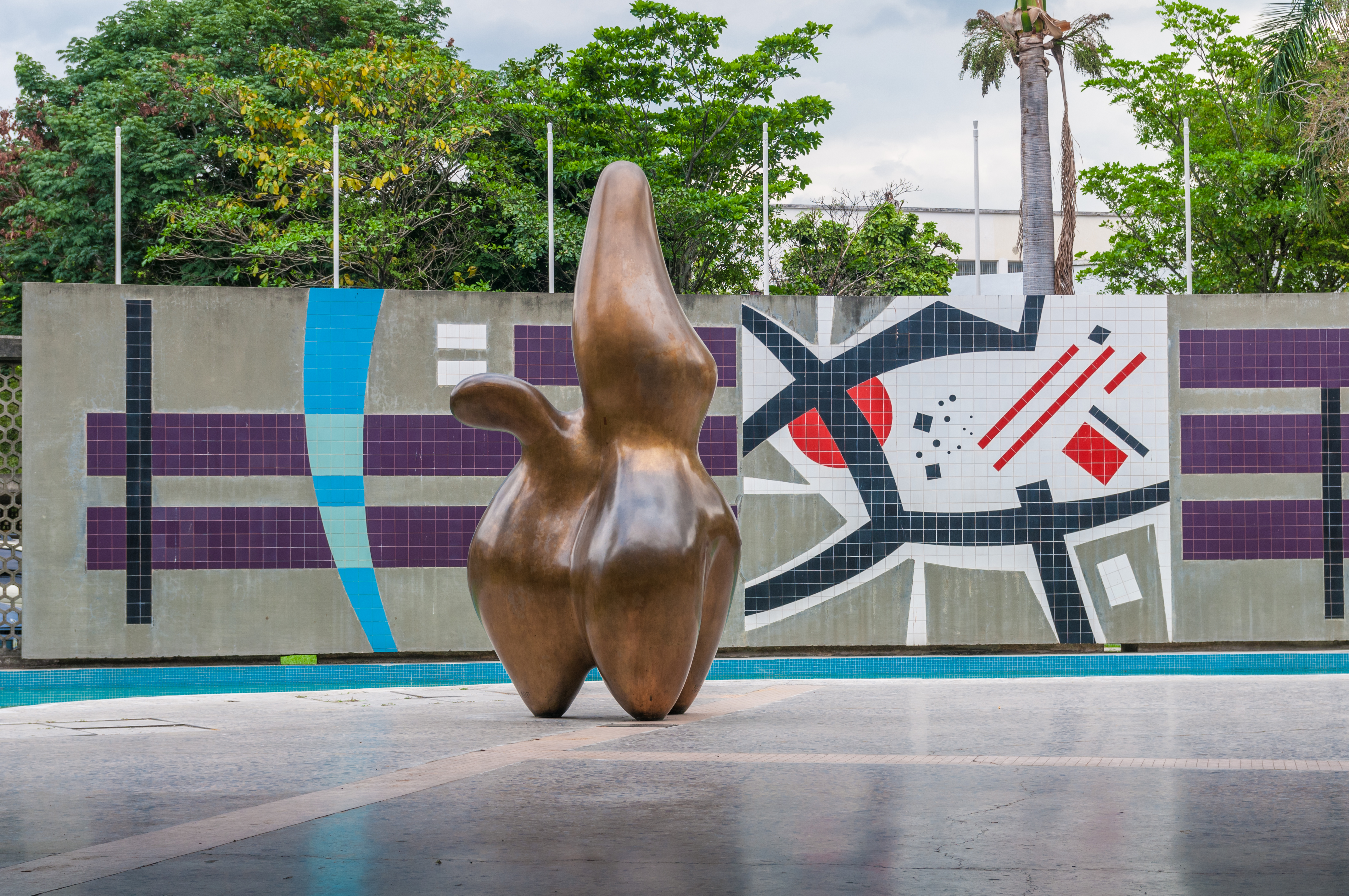 Autor: Jean Arp (1886 - 1996) Título: Pastor de Nubes o Formes de Lutin (1953) Ubicación: Plaza Cubierta del Rectorado Nota:El mural de detrás es de Mateo Manaure